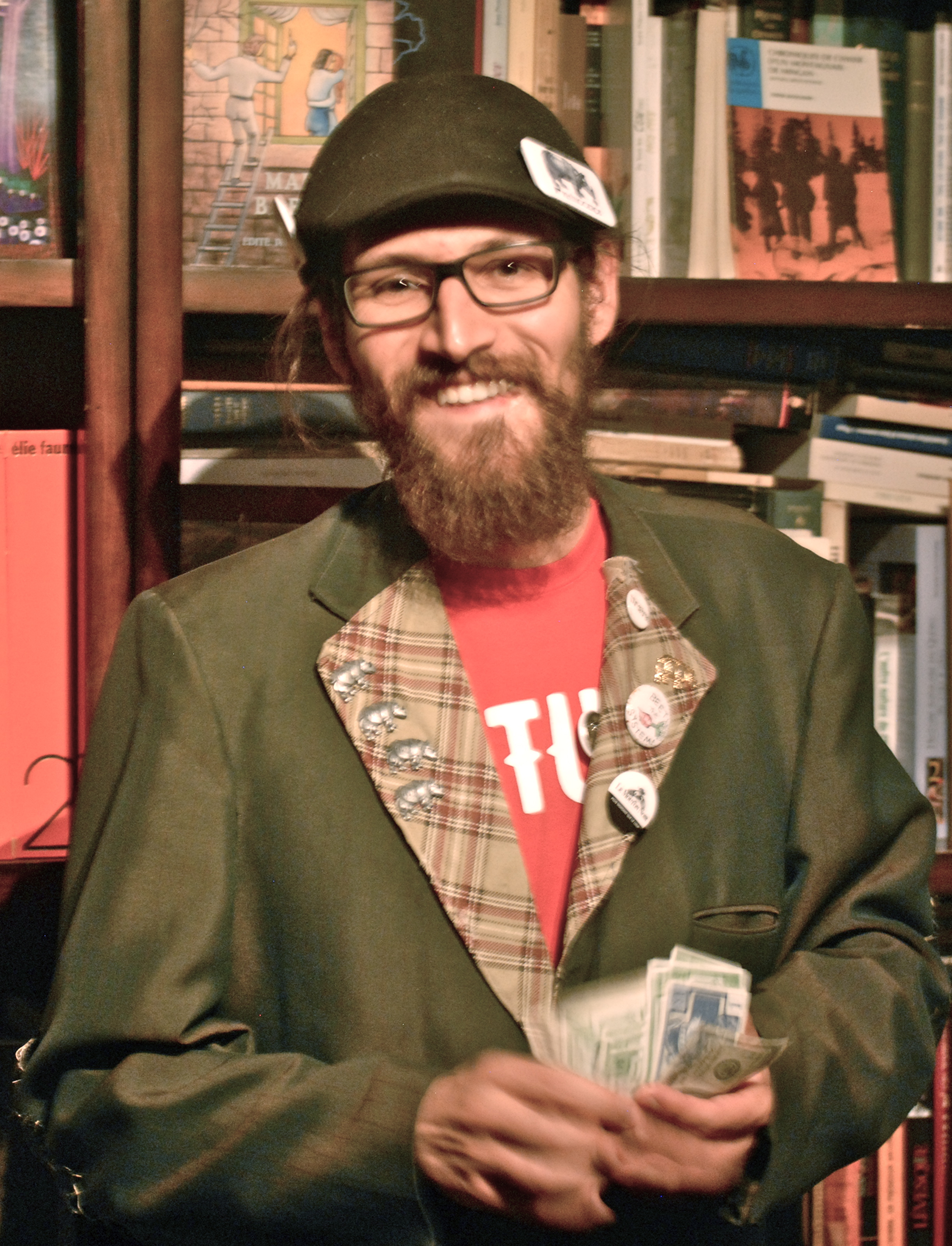 Sébastien Corriveau (CoRhino), chef du parti Rhinocéros du Canada, lors du lancement de sa campagne électorale dans la circonscription de Québec pour l'élection générale fédérale de 2019, à la librairie Saint-Jean-Baptiste, rue Saint-Jean, à Québec.